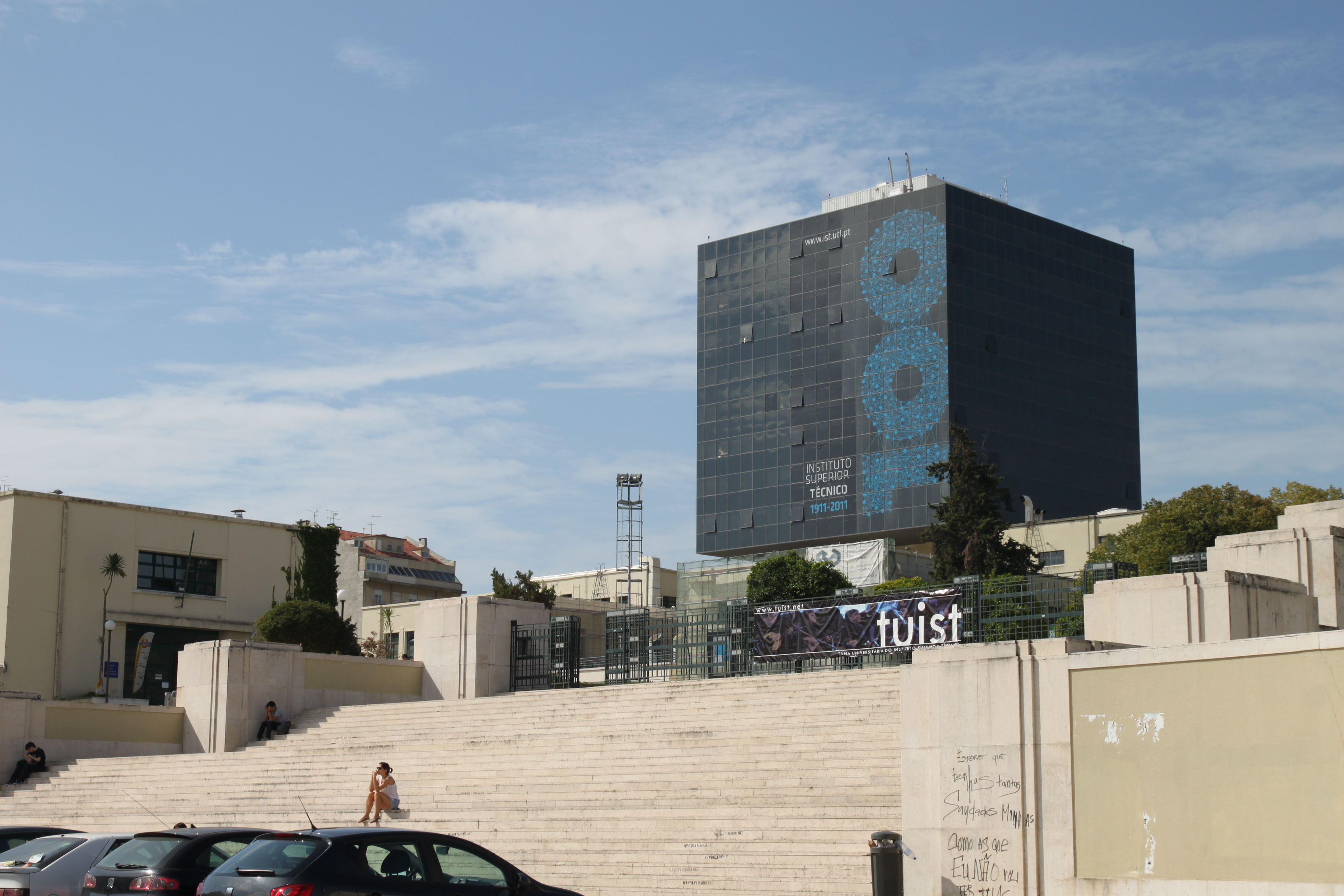 Instituto Superior Técnico This file was uploaded for Wiki Loves Monuments in Portugal with the unique identifier 97003162.